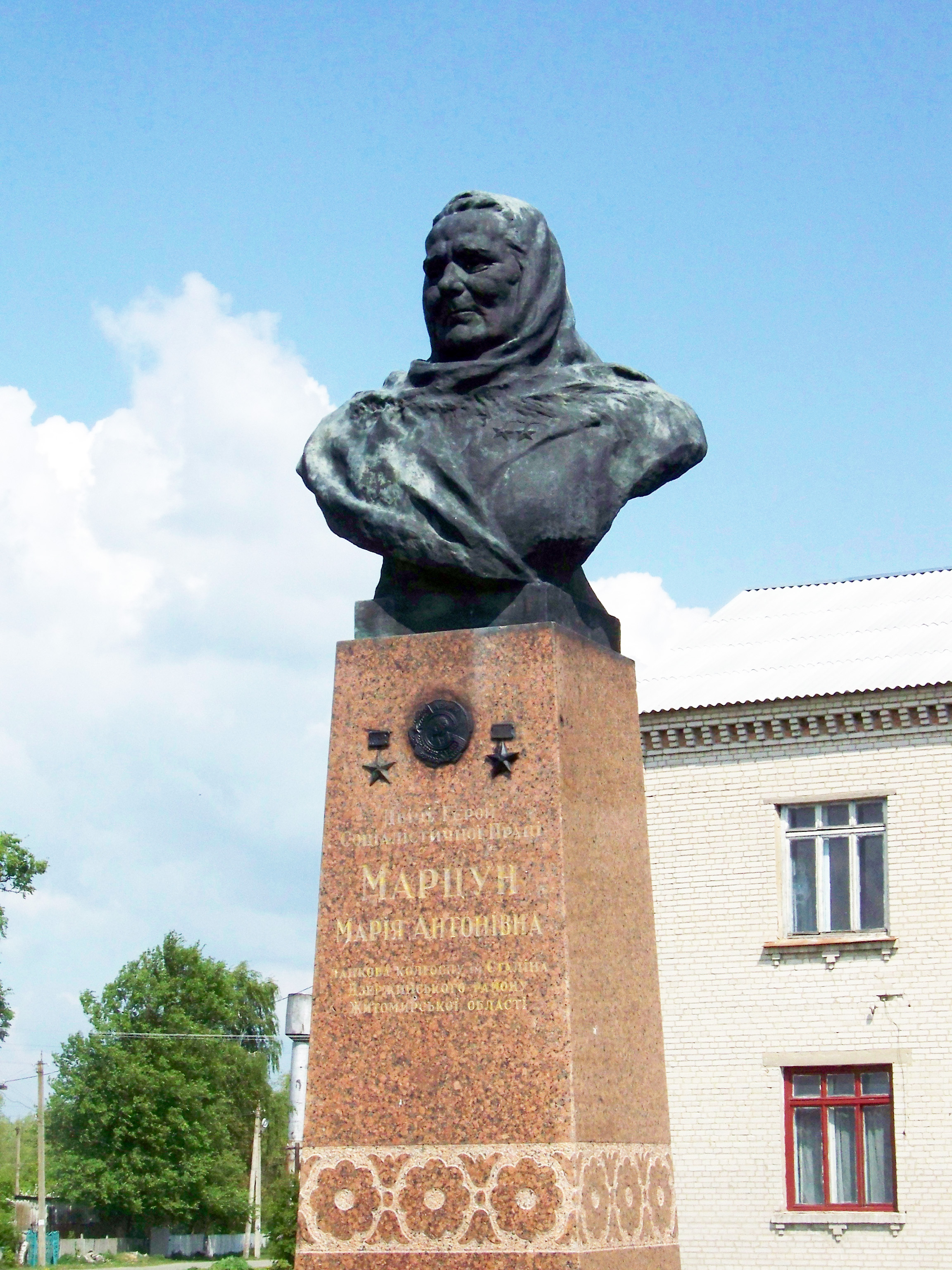 Марцун Марія Антонівна (1894 — 1970). с. Камінь, Житомирська область